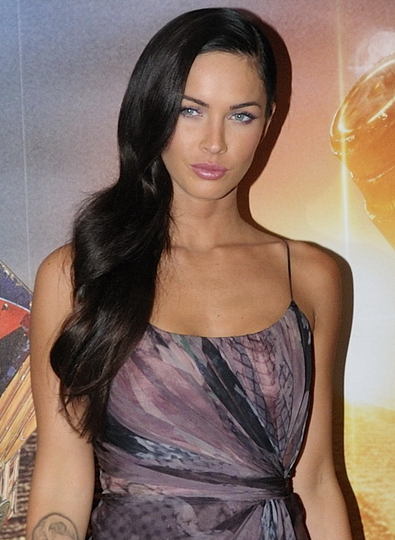 Megan Fox au Georges V à Paris, pour la promo du film Transformers 2 : la revanche